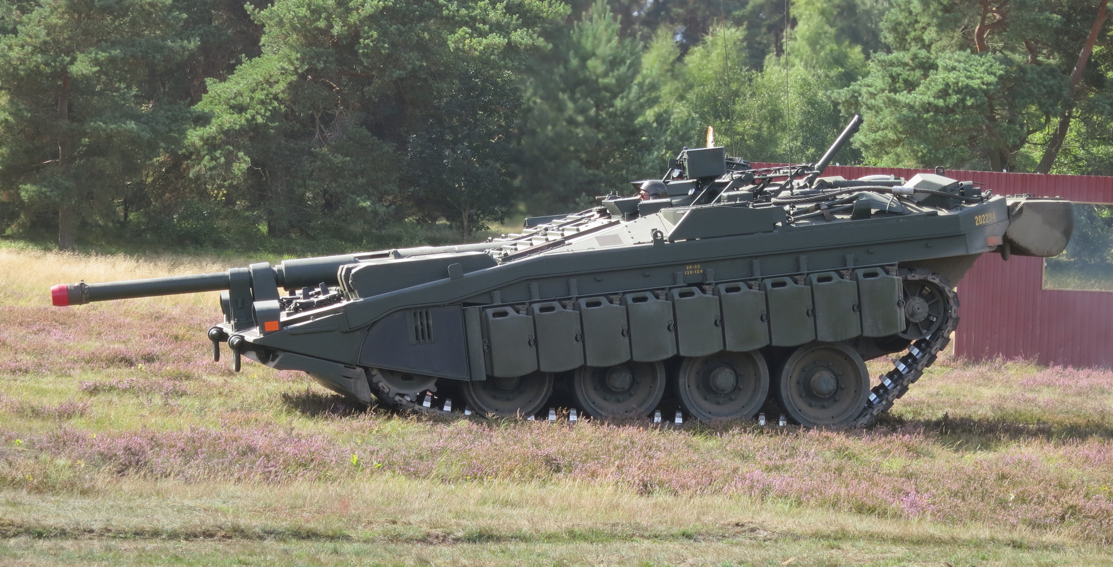 Framåtlutad Stridsvagn 103 (Stridsvagn S) vid Regementets Dag på P7 Revingehed